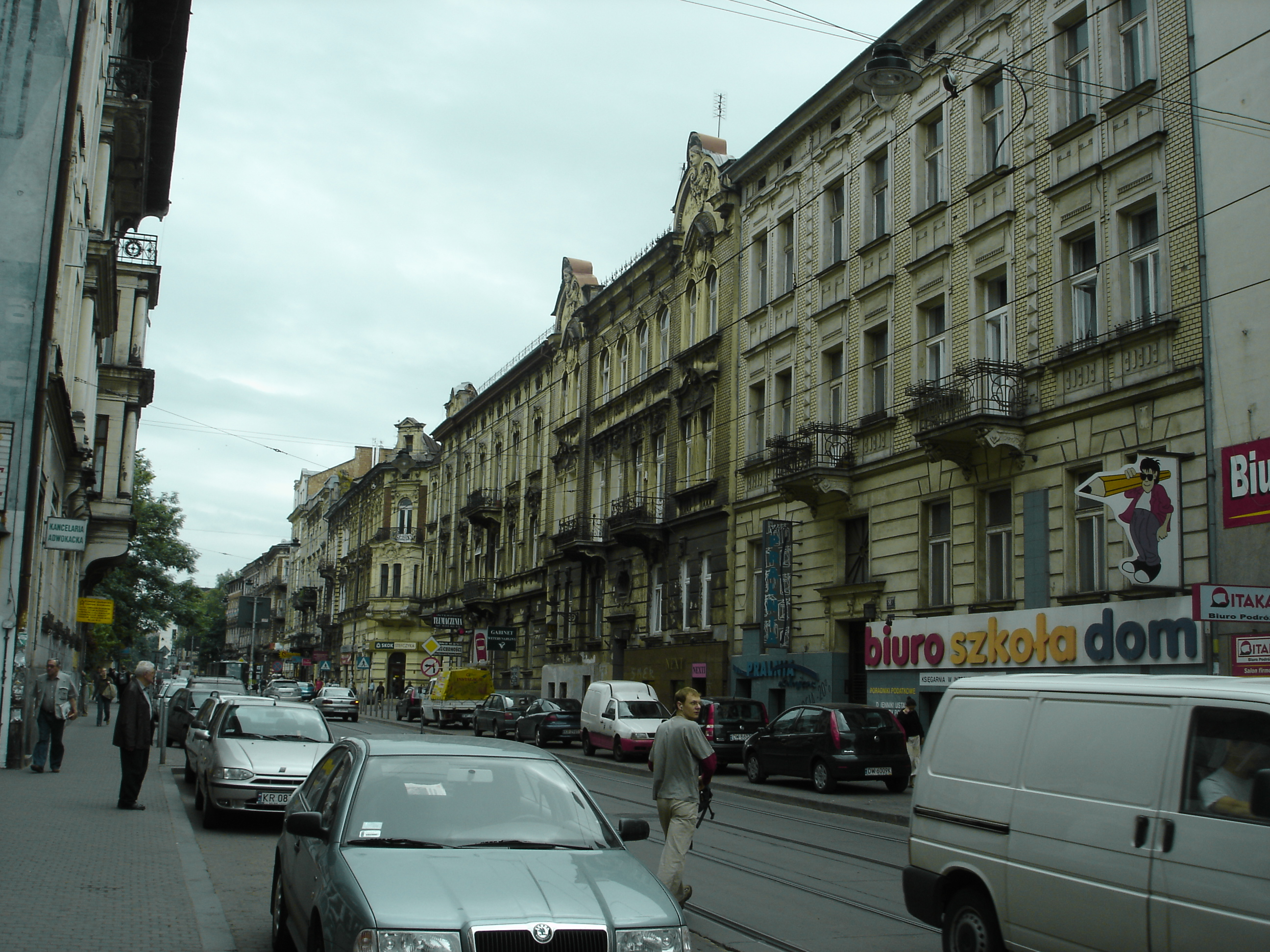 Kamienice na ul. Karmelickiej w Krakowie